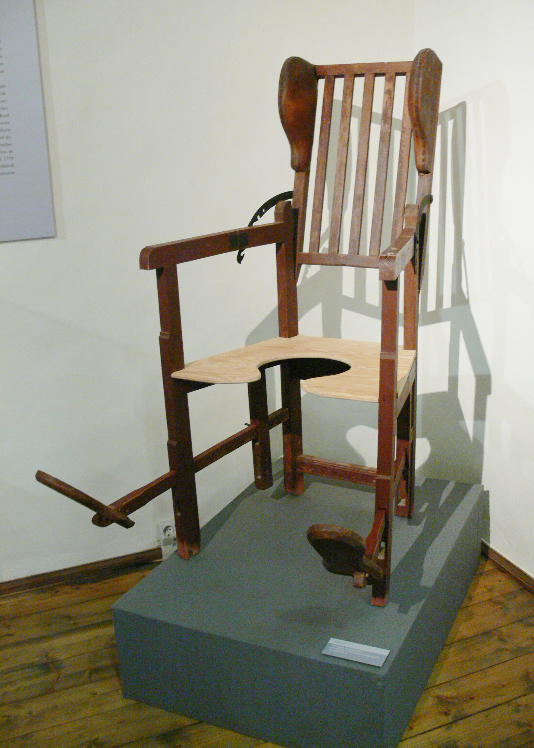 Museum für Thüringer Volkskunde, Erfurt Gebärstuhl, Ende 19. Jh., Evangelisch-lutherische Kirchengemeinde Sülzenbrücken